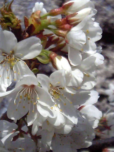 石戸蒲ザクラ（国天然記念物）。 蒲桜は樹齢800年。国天然記念物。山桜と江戸彼岸の自然交配種で、世界に一本しか存在しない。